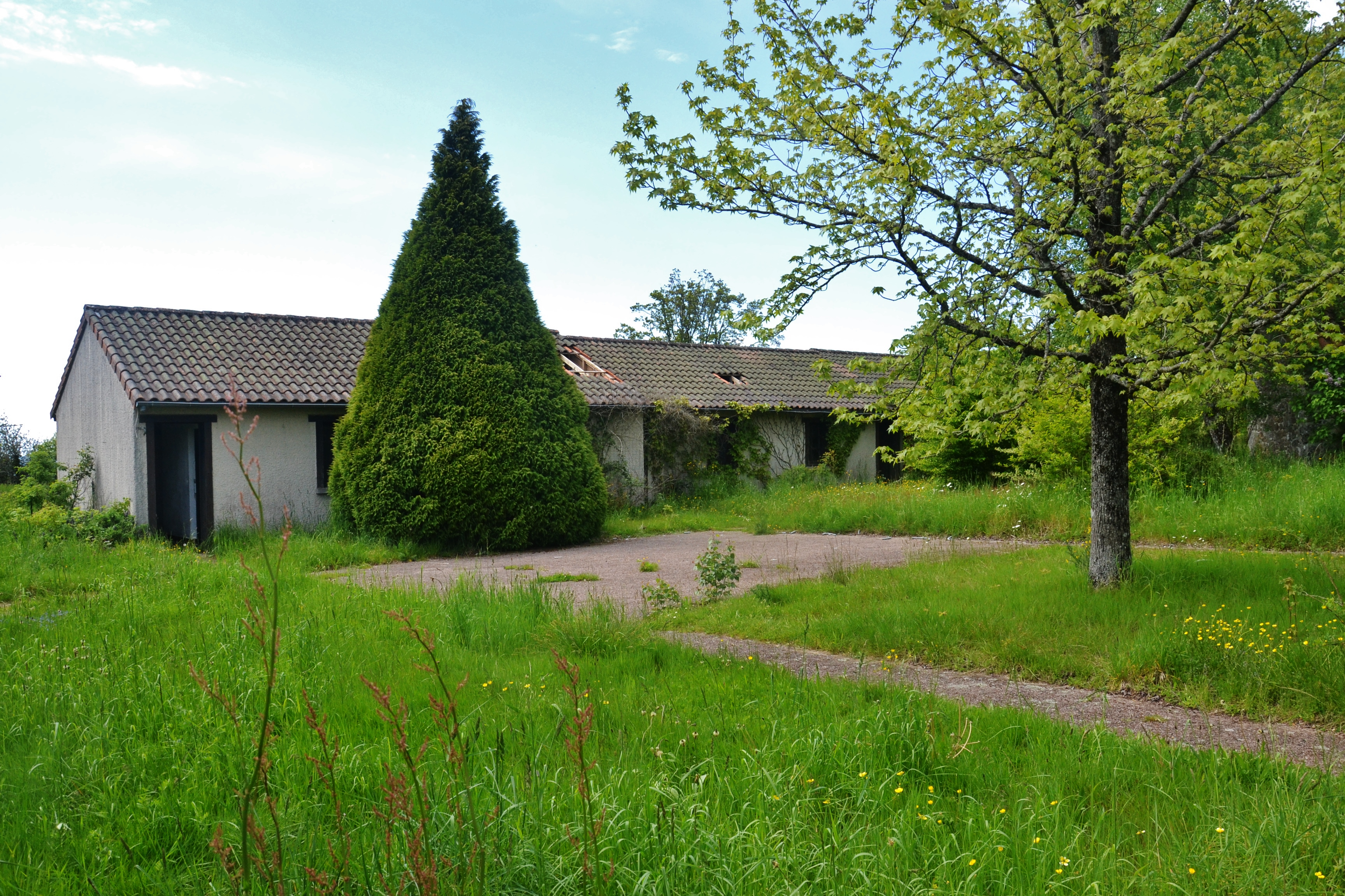 Le village abandonné de Courbefy (Bussière-Galant, Haute-Vienne, France)